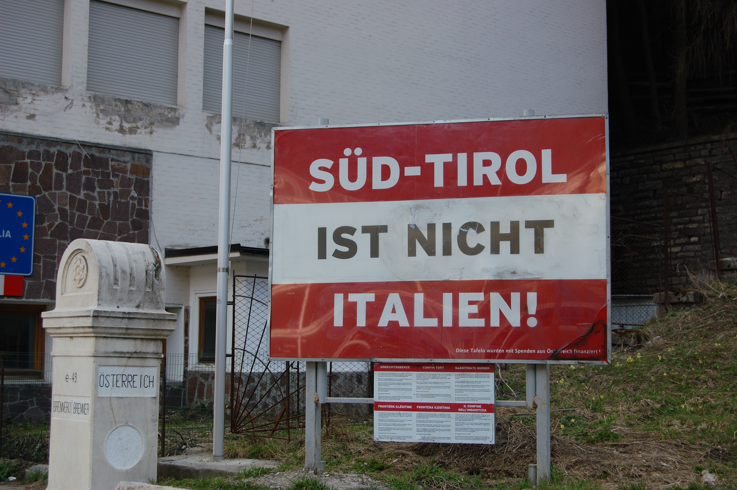 Tafel der Bewegung SÜD-Tiroler Freiheit an der Brenner-Unrechtsgrenze